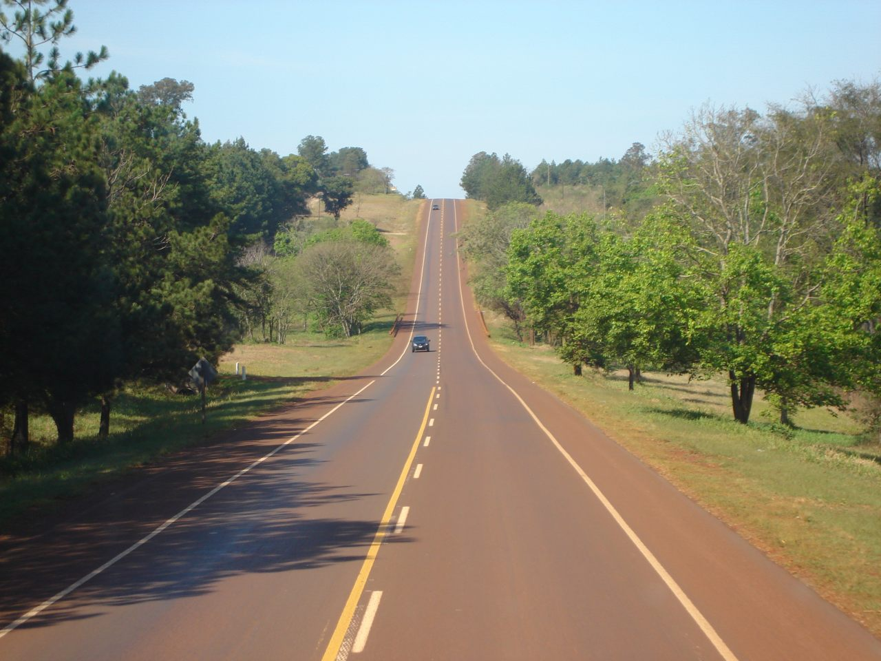 La Ruta Nacional 12 de la República Argentina a su paso por la provincia de Misiones, en cercanías de Puerto Iguazú.